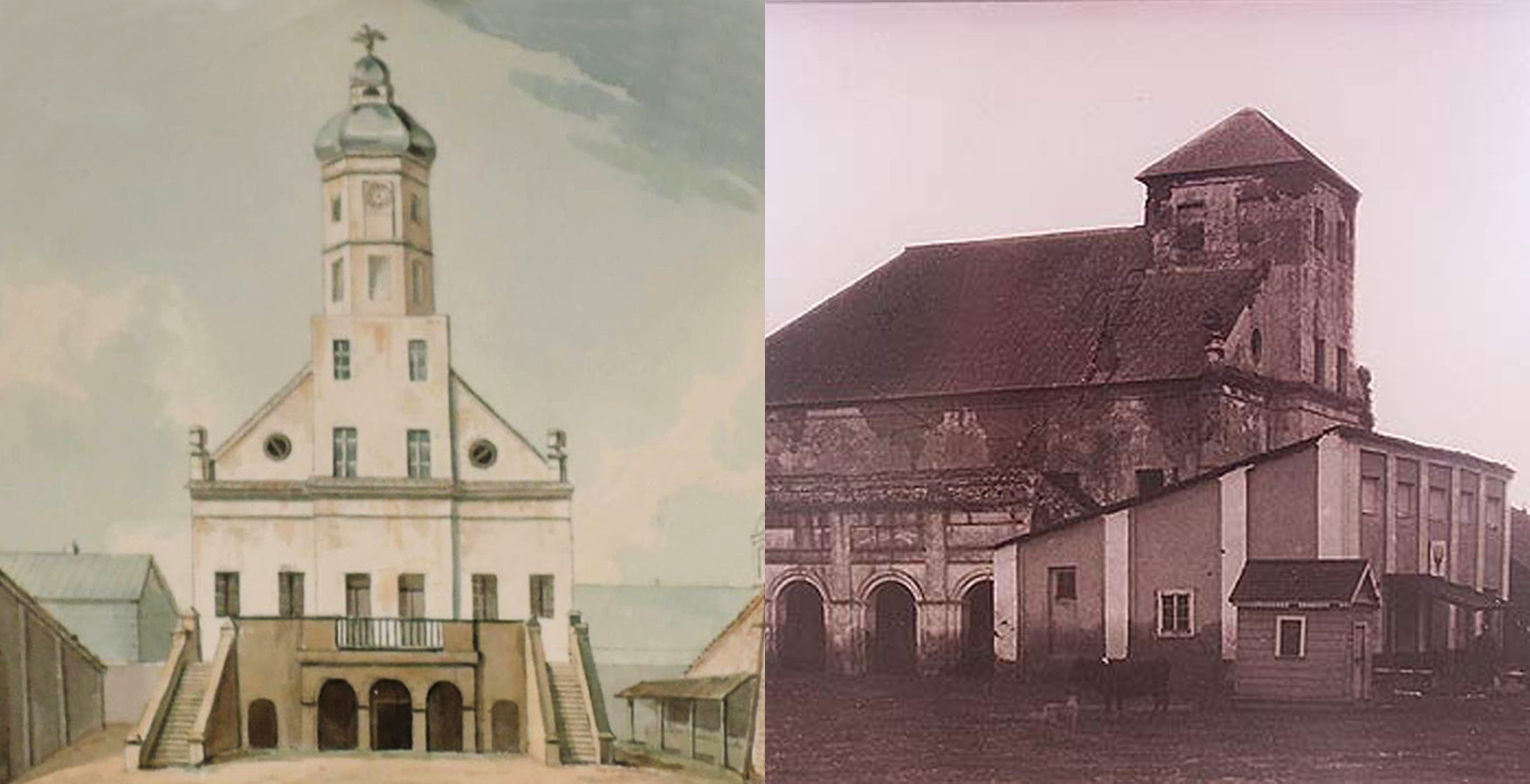 Беларуская (тарашкевіца): Маскалізацыя (русіфікацыя) Вялікага Княства Літоўскага. Места Нясьвіж Наваградзкага павету. Ратуша, помнік архітэктуры барока: аўтэнтычны выгляд (налева) і па частковым руйнаваньні (направа)